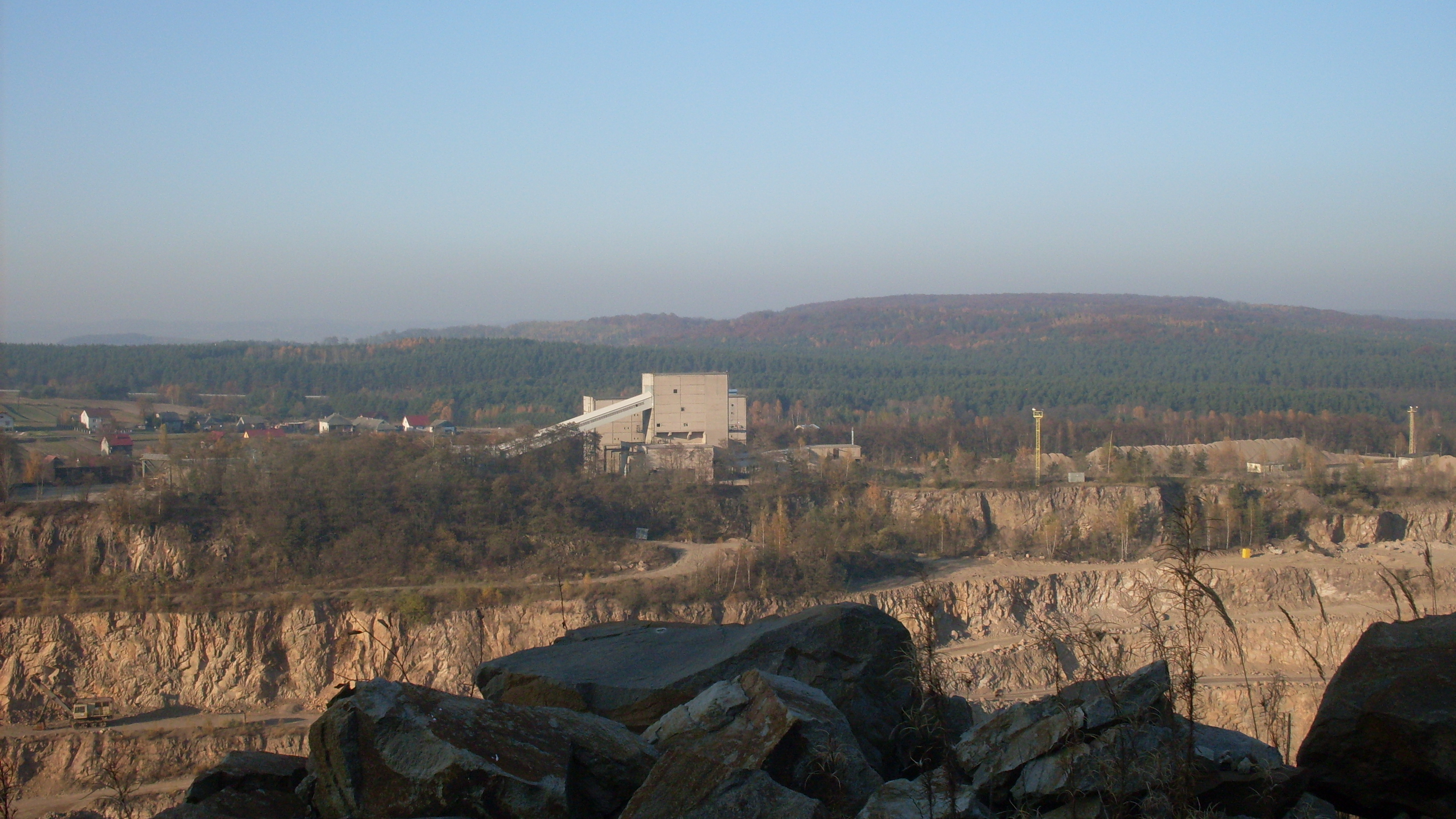 Bukowa Góra - widok z kamieniołomu Zalas